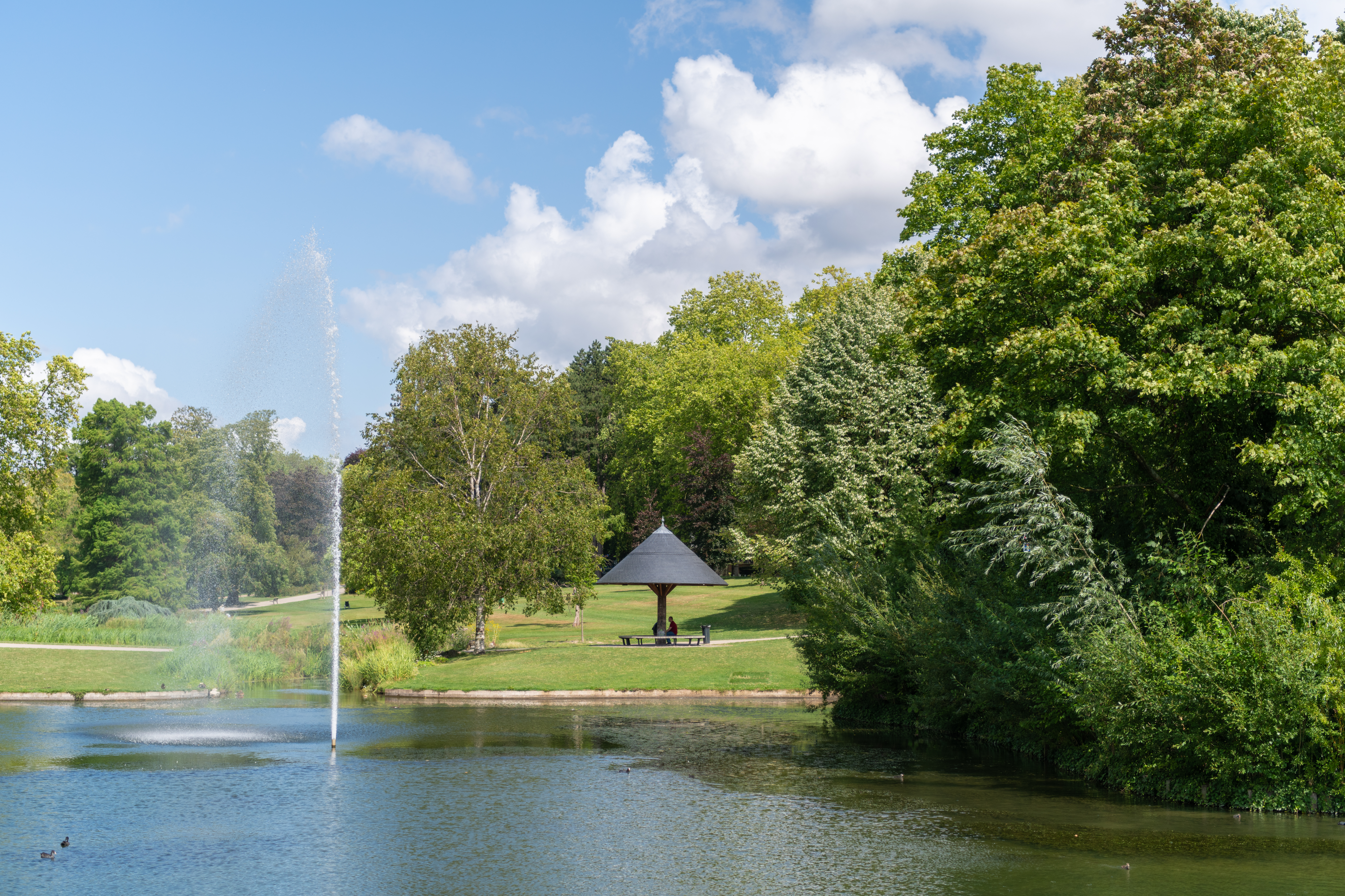 Le Parc Barbieux et son plan d'eau. Nature. Balade. Promenade.